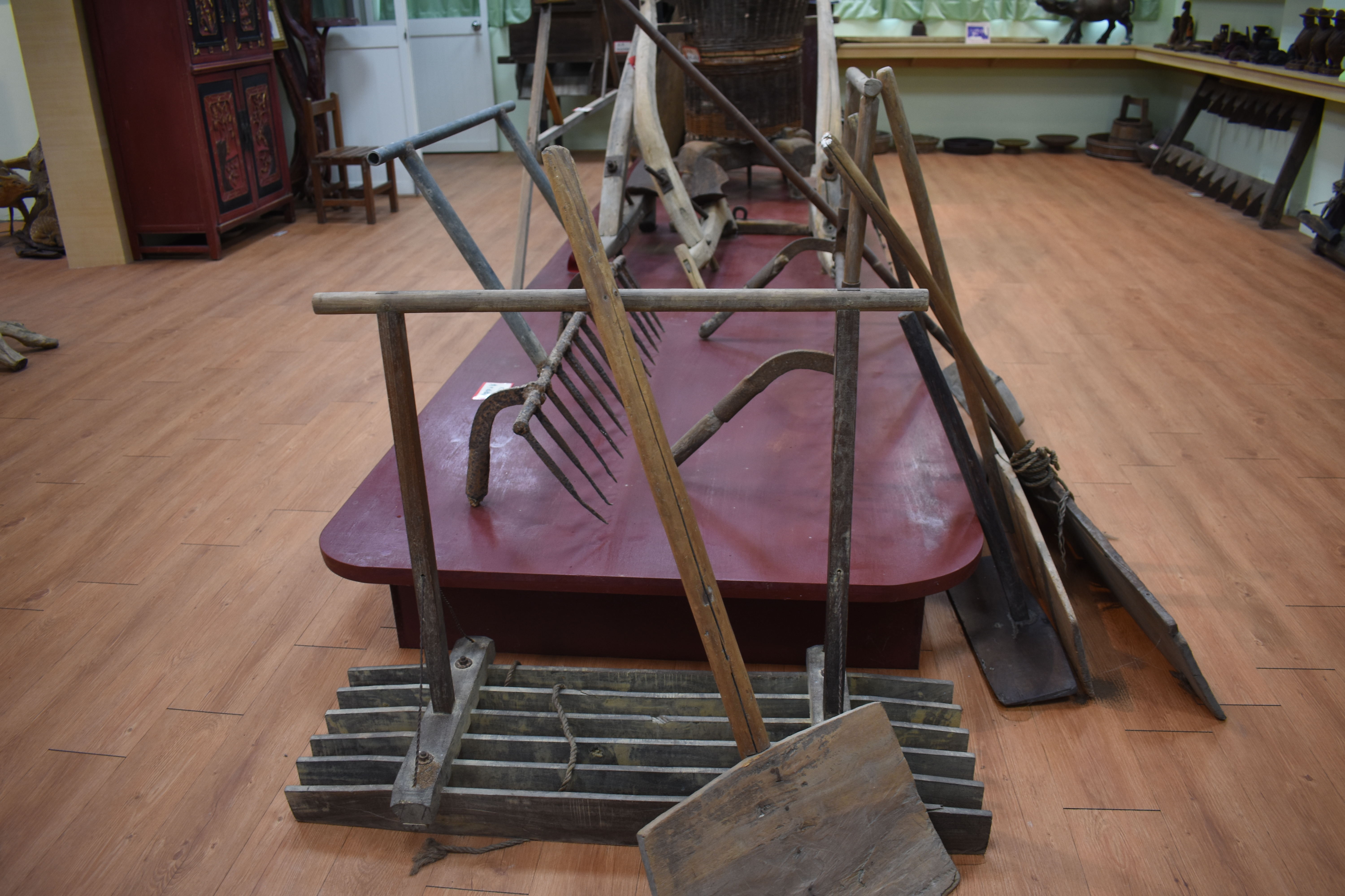 內柵國民小學古物4「傳統農村田地整地用具」-鐵製手耙